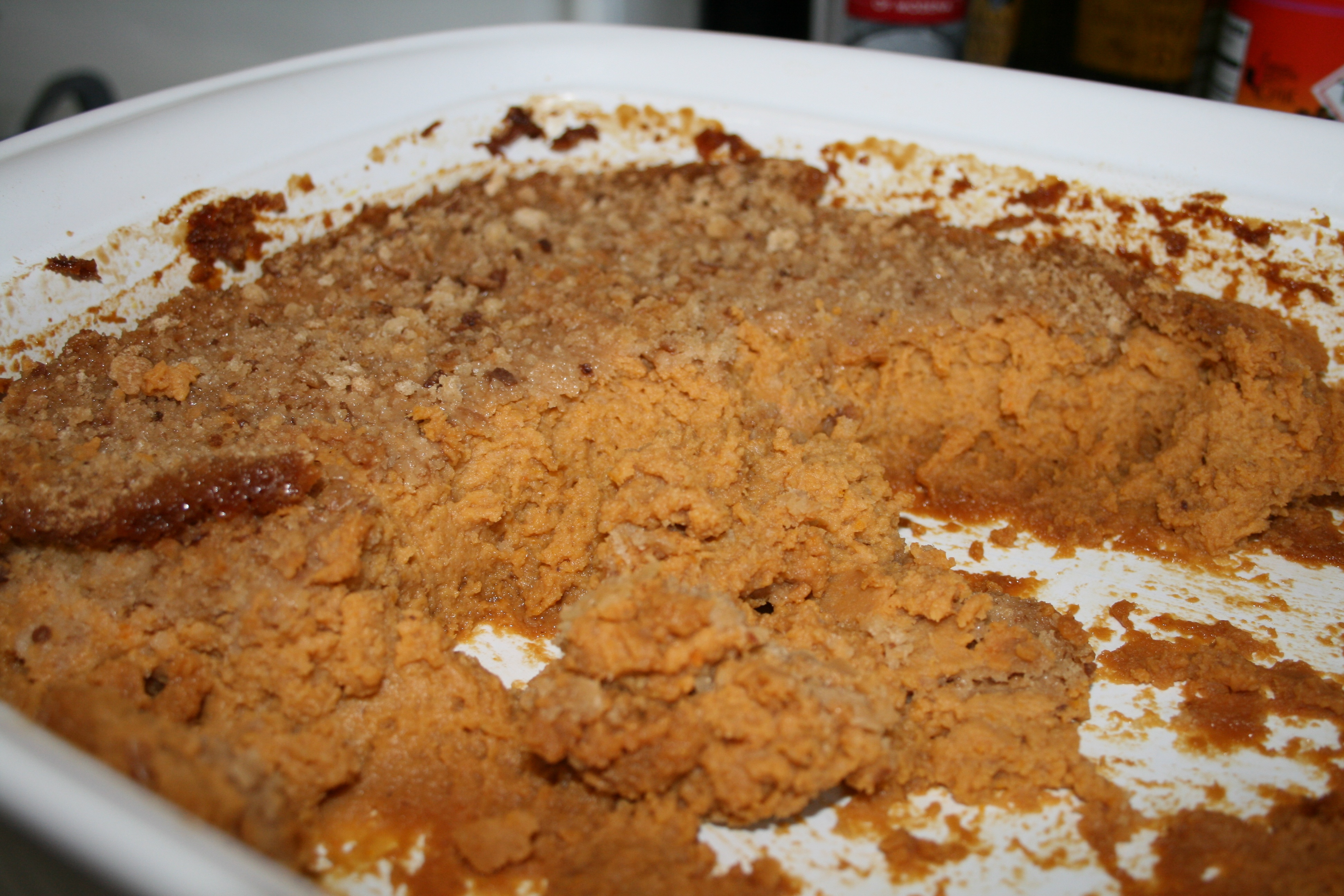 A traditional Finnish rutabaga casserole dish served during the holiday season.